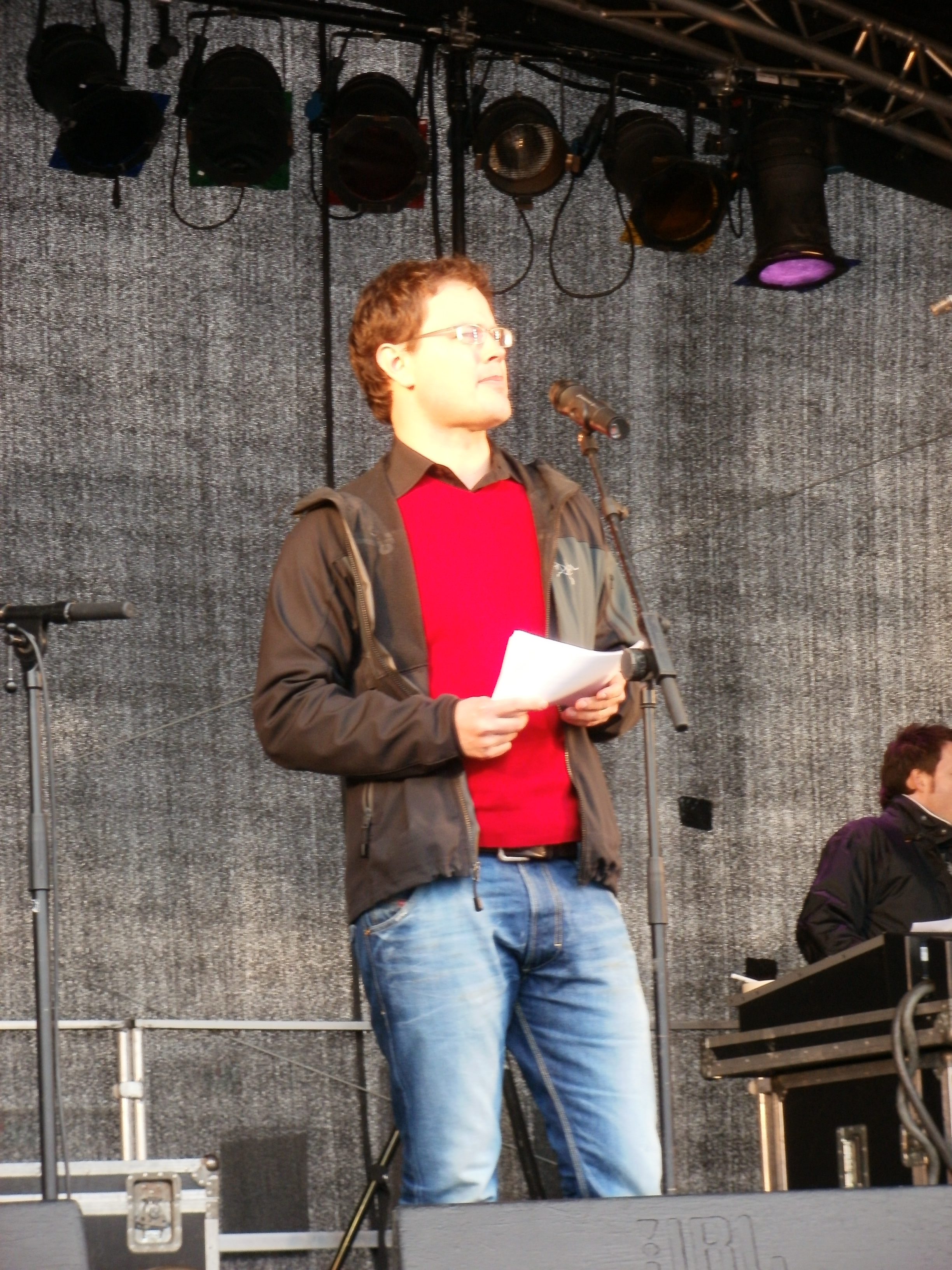 Jonas Dahl taler ved 1. maj 2010